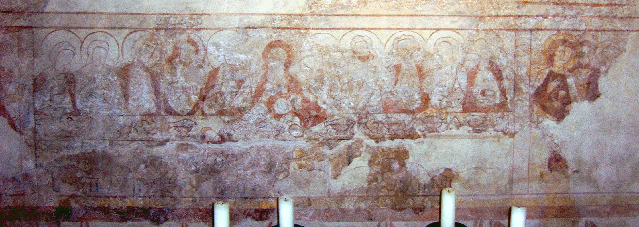 Das Abendmahl darstellendes Fresko in der Johanneskirche in Aalen